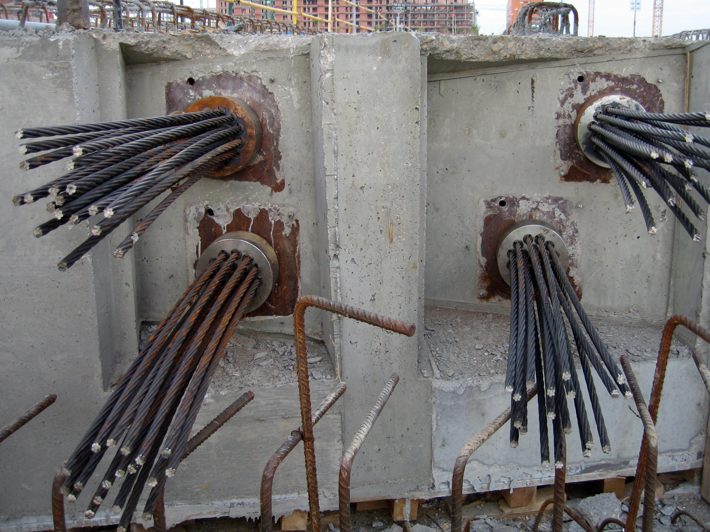 Cables de acero preparados para postensar en el tablero de un puente.